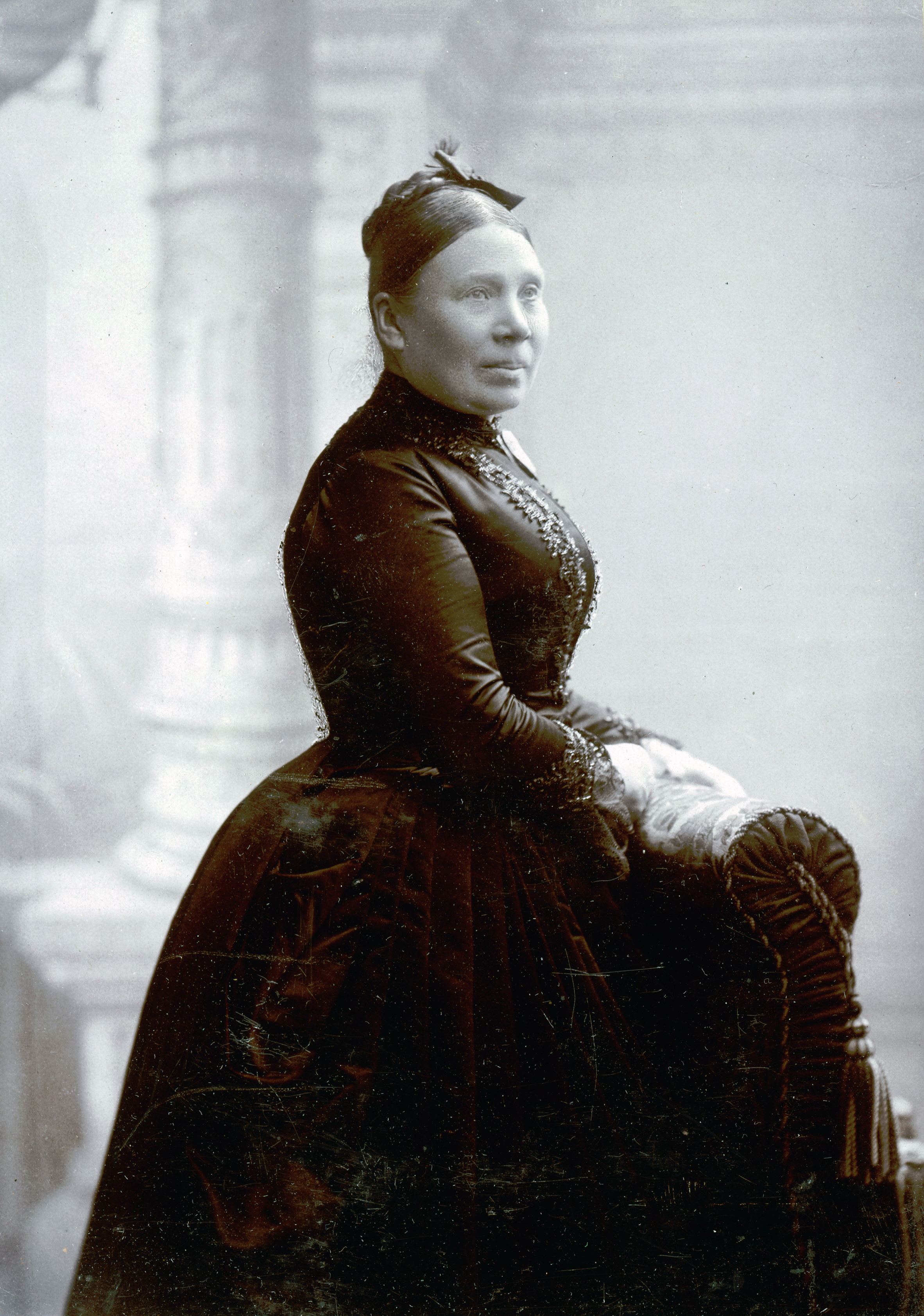 Amanda Rylander, skådespelare vid Stora teatern i Göteborg 1890